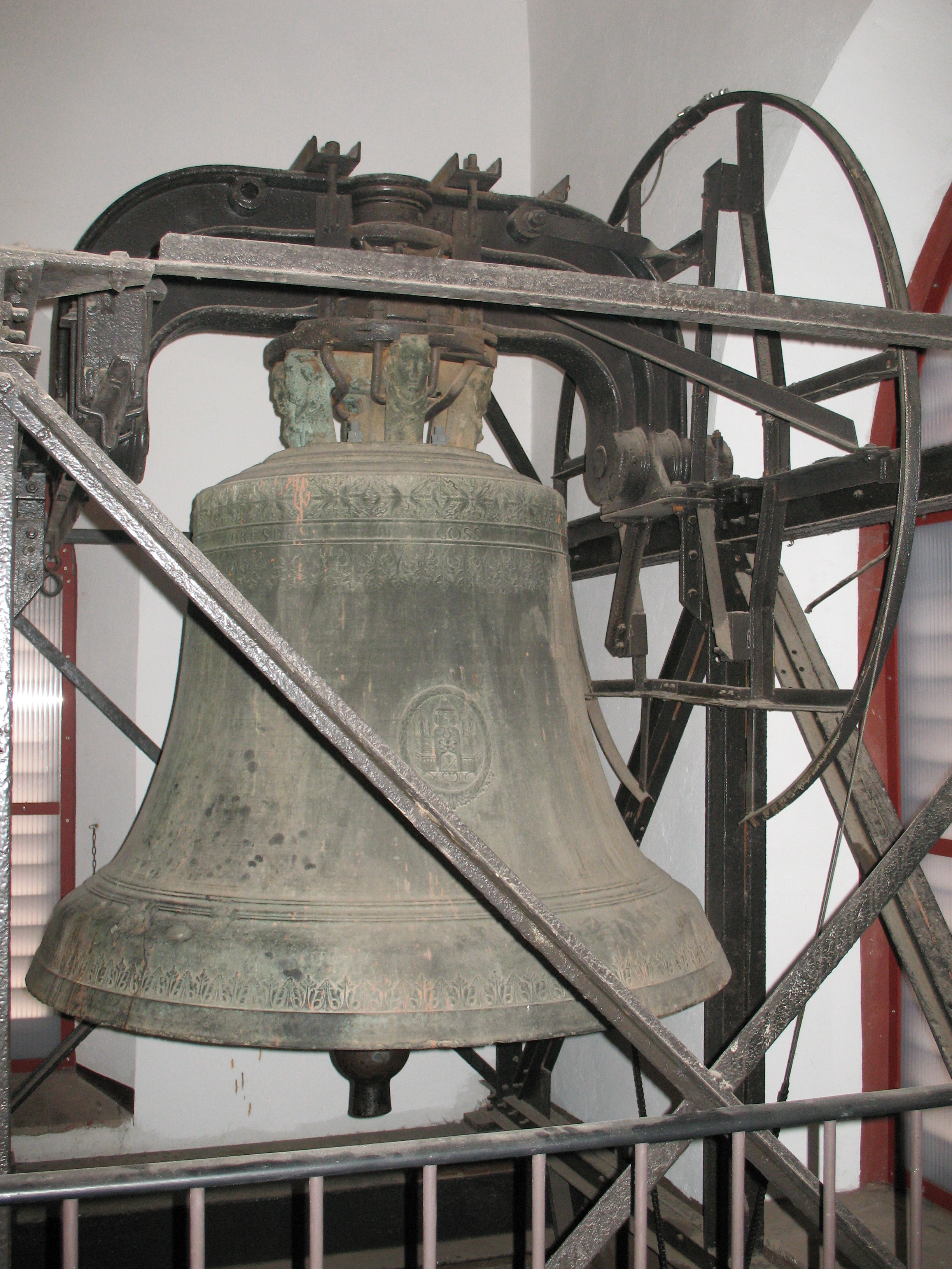 Stadtkirche St. Jakobi (Chemnitz), Glocke 1, Nominal b°